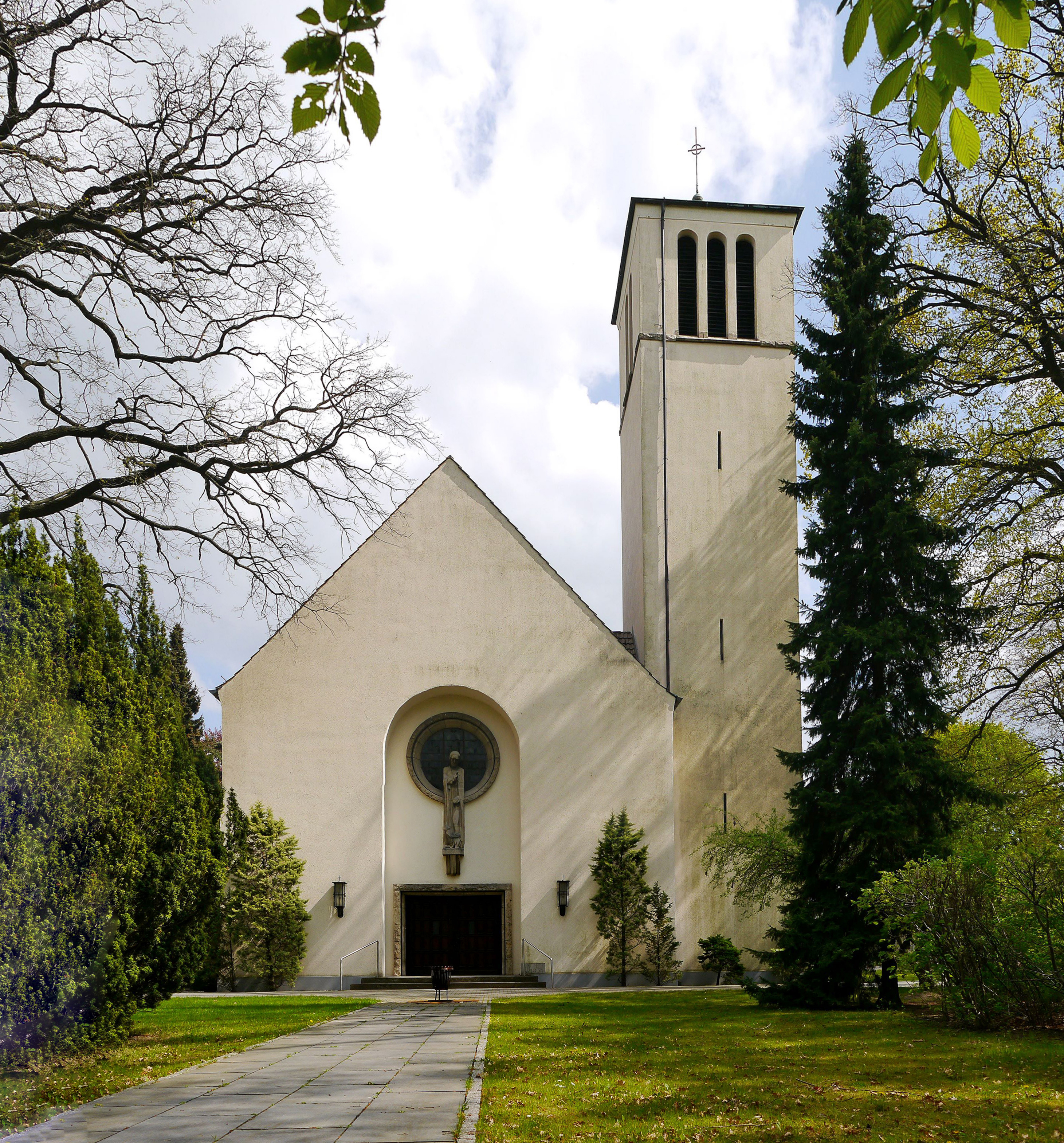 Baudenkmal: Ruhlsdorfer Straße 28, Teltow, Katholische Kirche Sanctissima Eucharistia. Die Steinfigur des brotsegnenden Christus schuf Rudolf Brückner-Fuhlrott 1959.